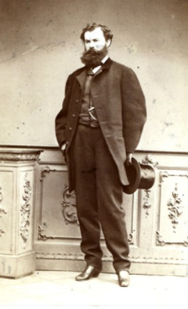 Otto Polak (1839-1916), rakouský a český politik